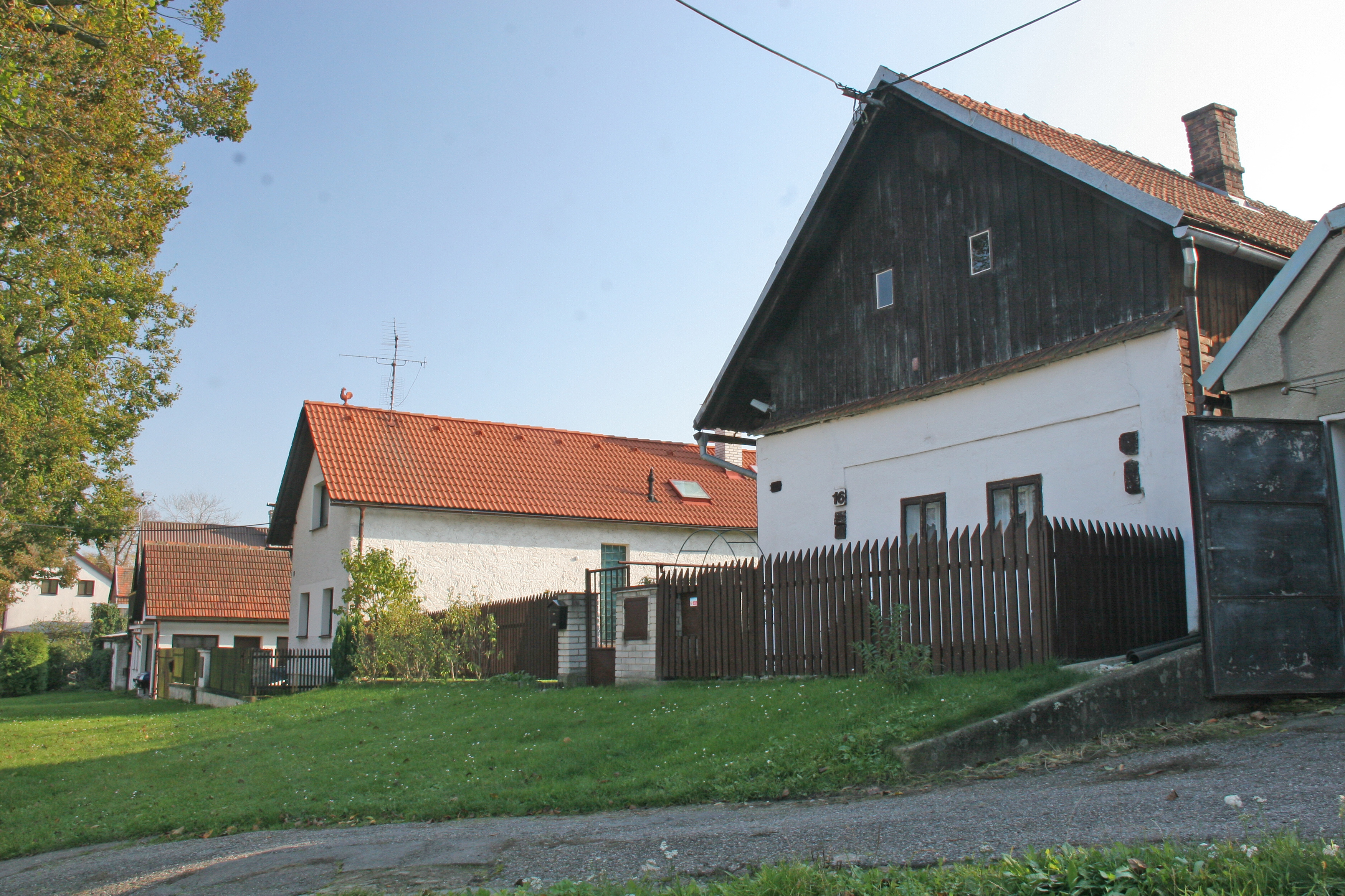 Nová Ves čp. 16